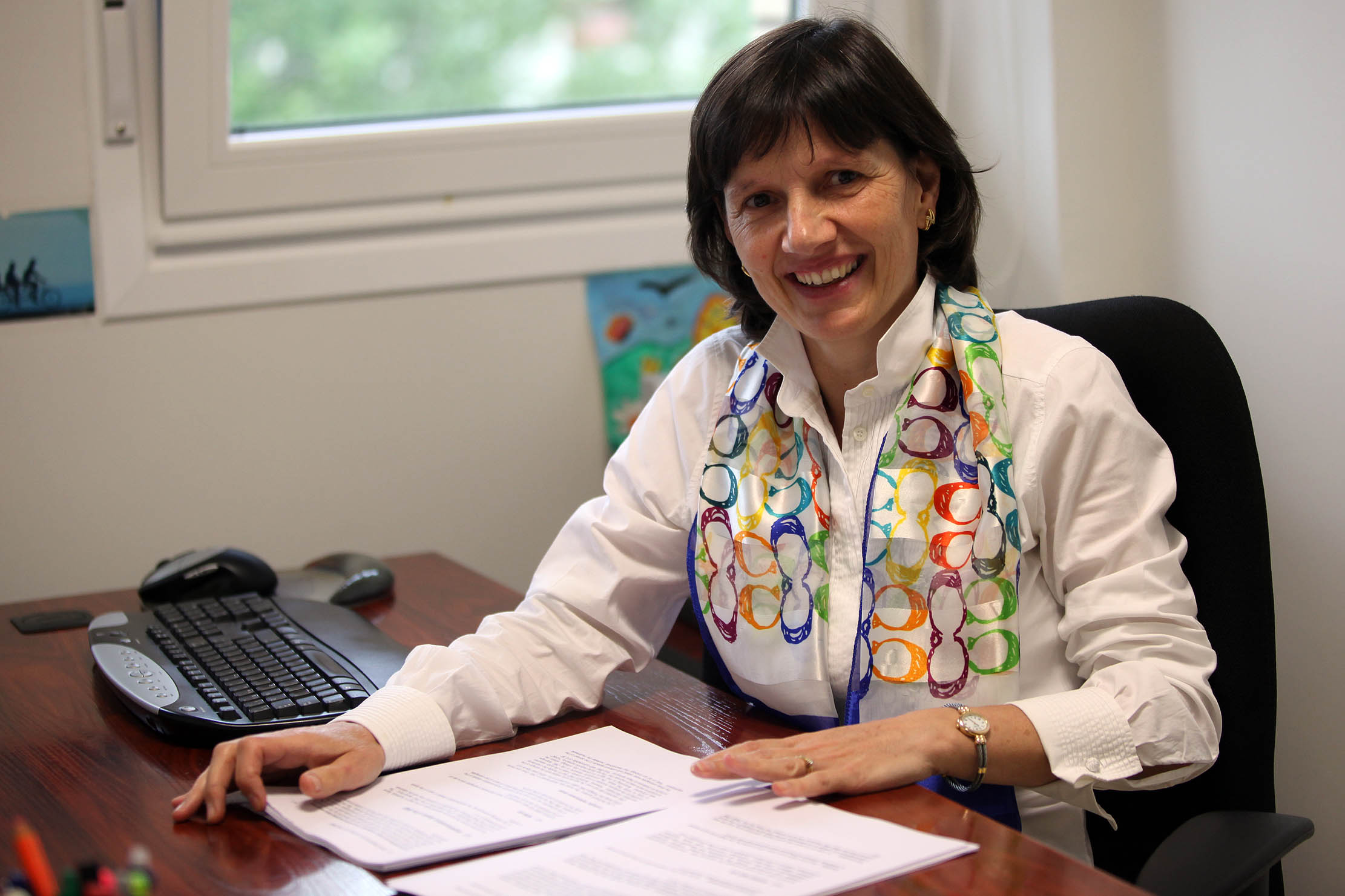 Arantza Illarramendi 2010.an